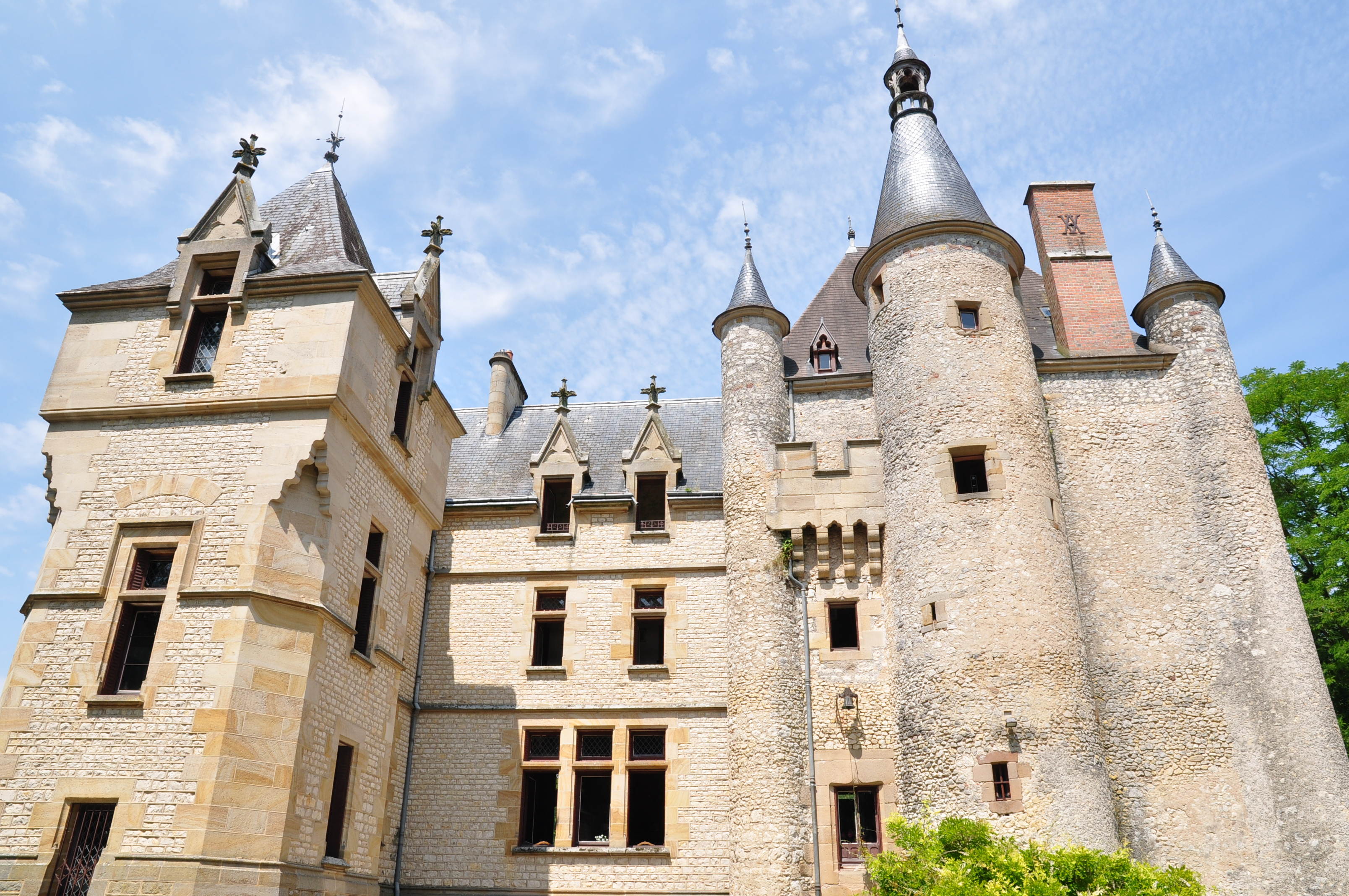 Batiment principale